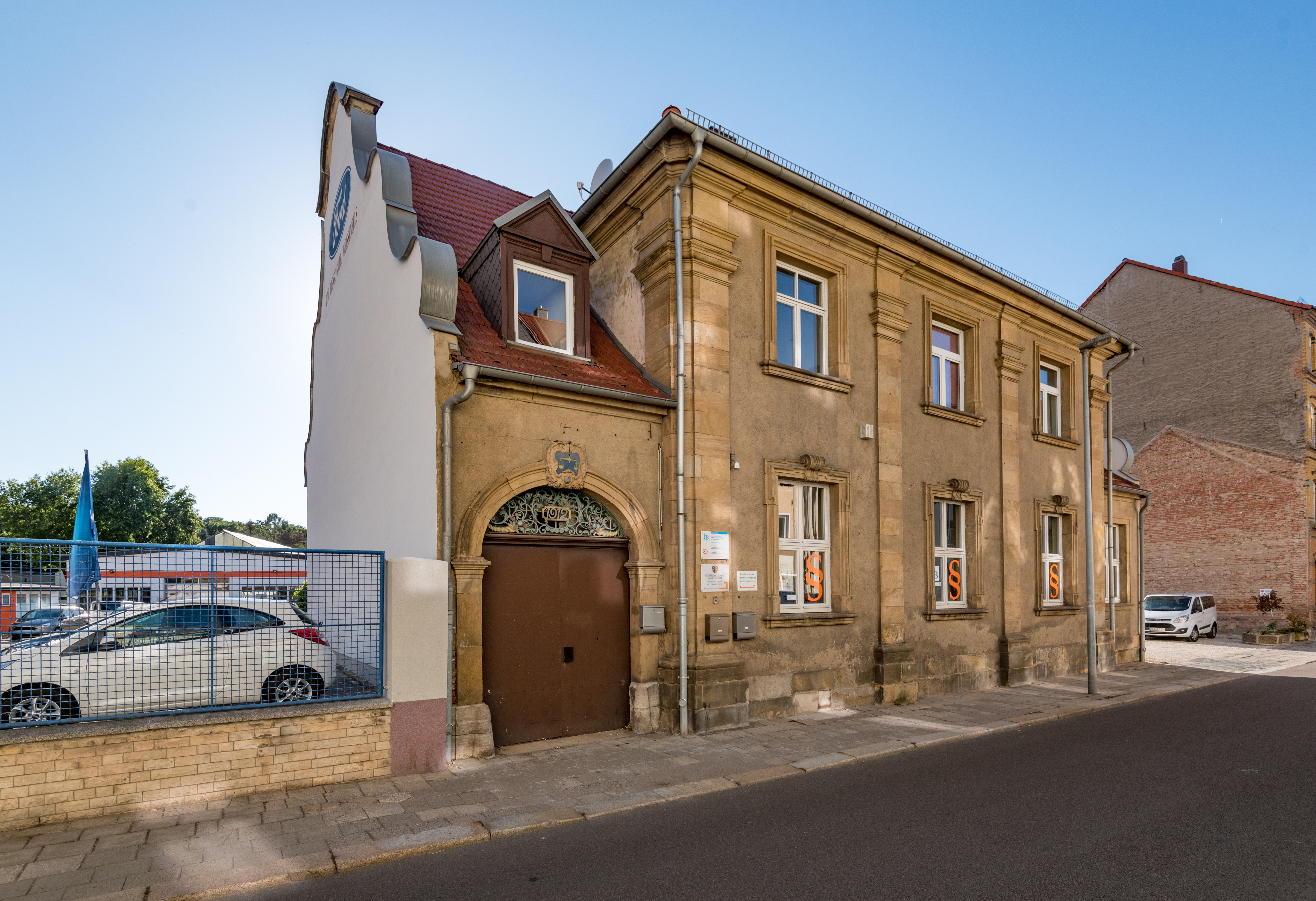 Weißenfels, Kleine Deichstraße 8